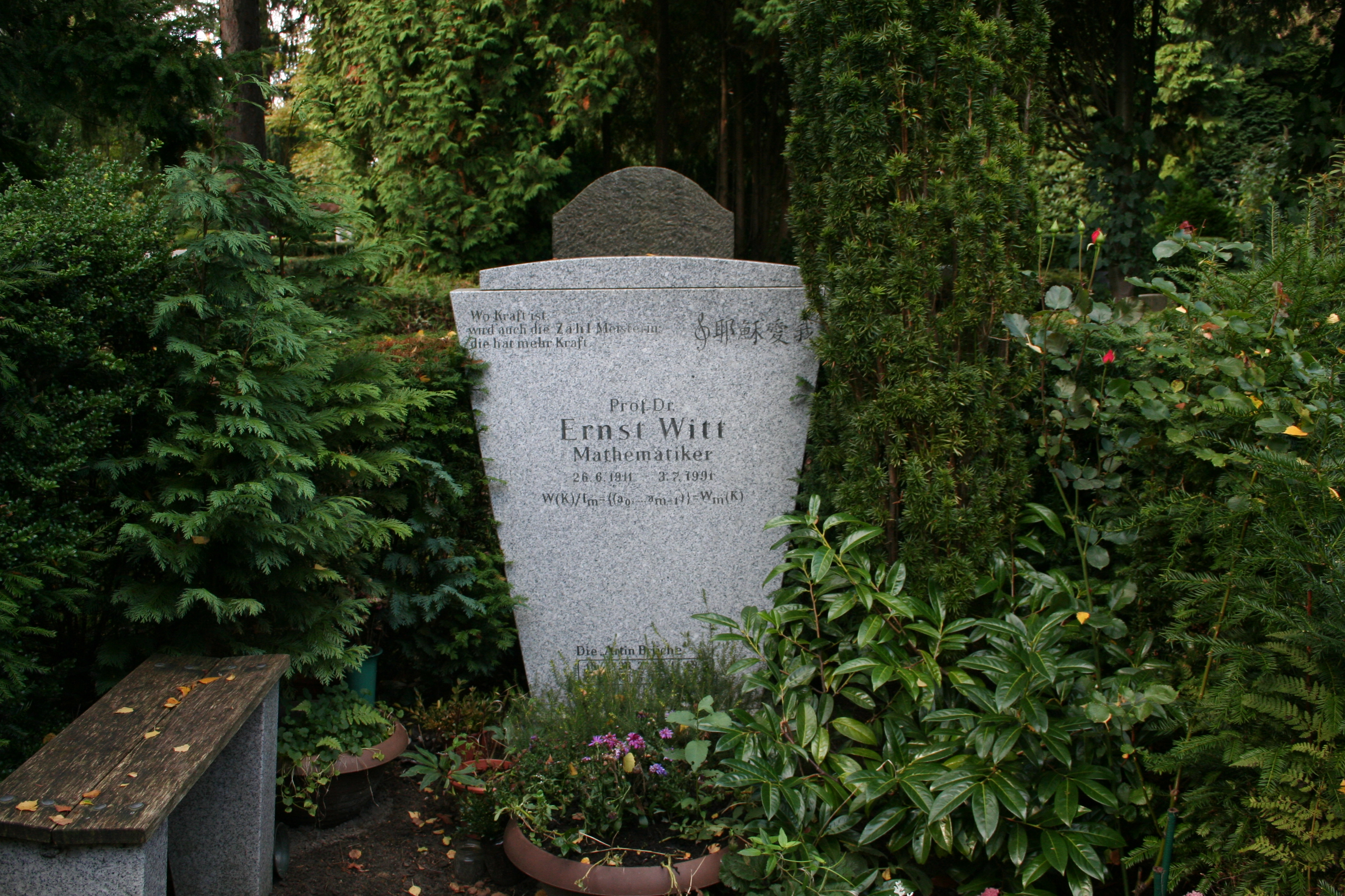 Der Mathematiker Ernst Witt beschäftigte sich mit quadratischen Formen und algebraischen Funktionenkörpern. Nach ihm sind die Witt-Vektoren benannt.